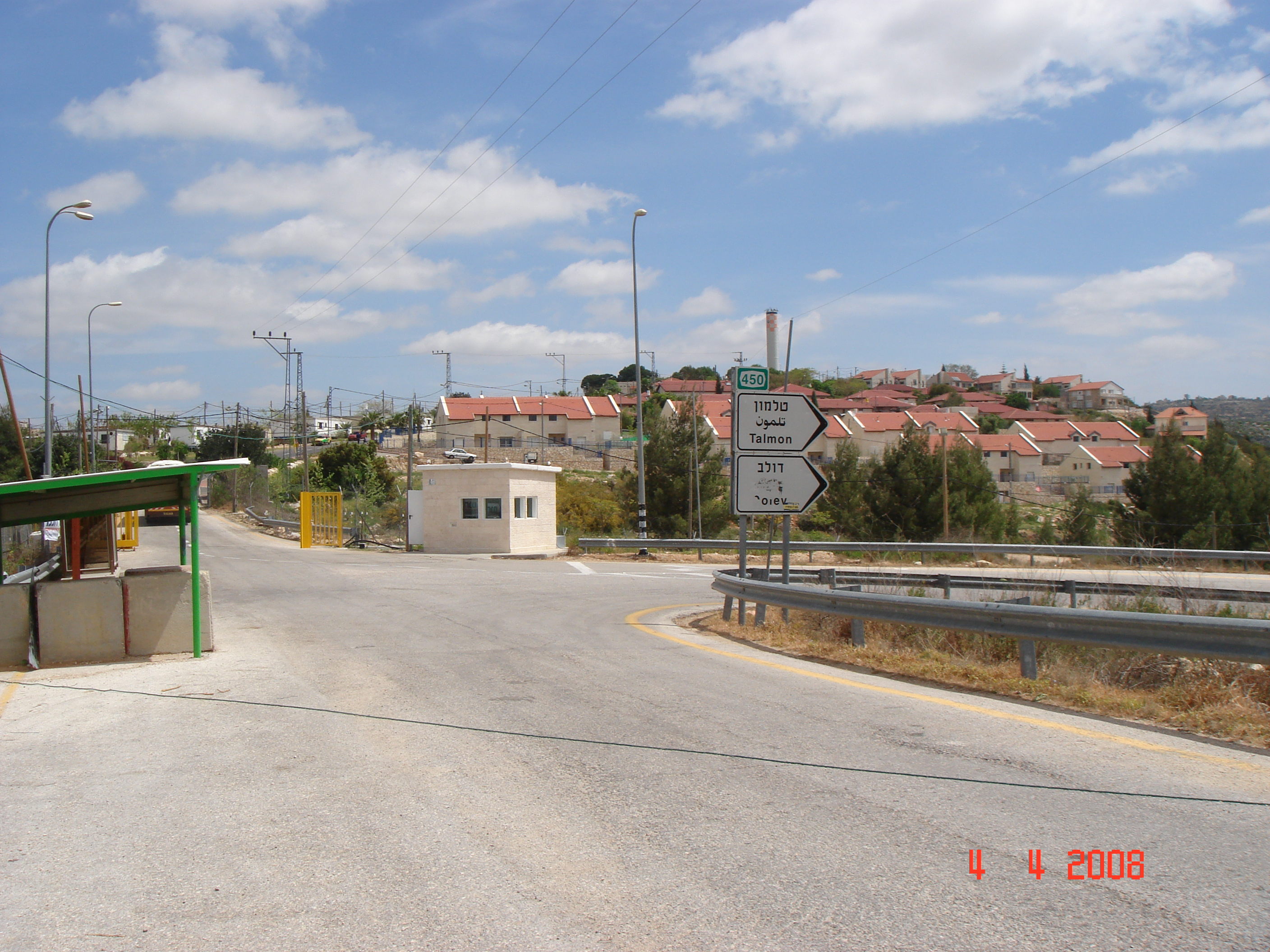 הישוב נחליאל, אפריל 2008.